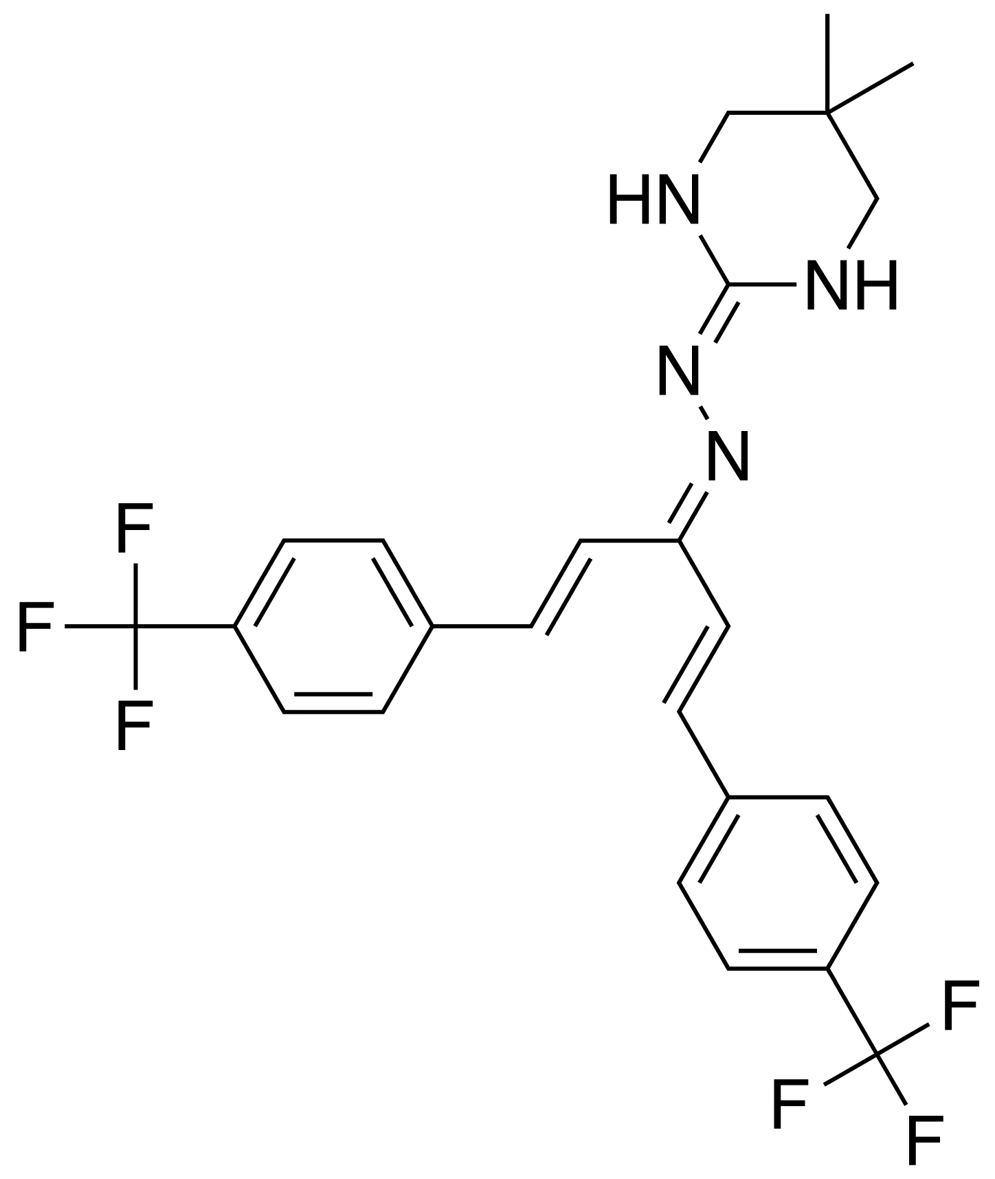 Hydramethylnon